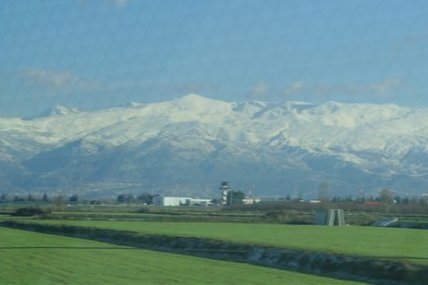 Sierra Nevada vista desde la localidad de Cijuela, junto al Aeropuerto de Granada (España).